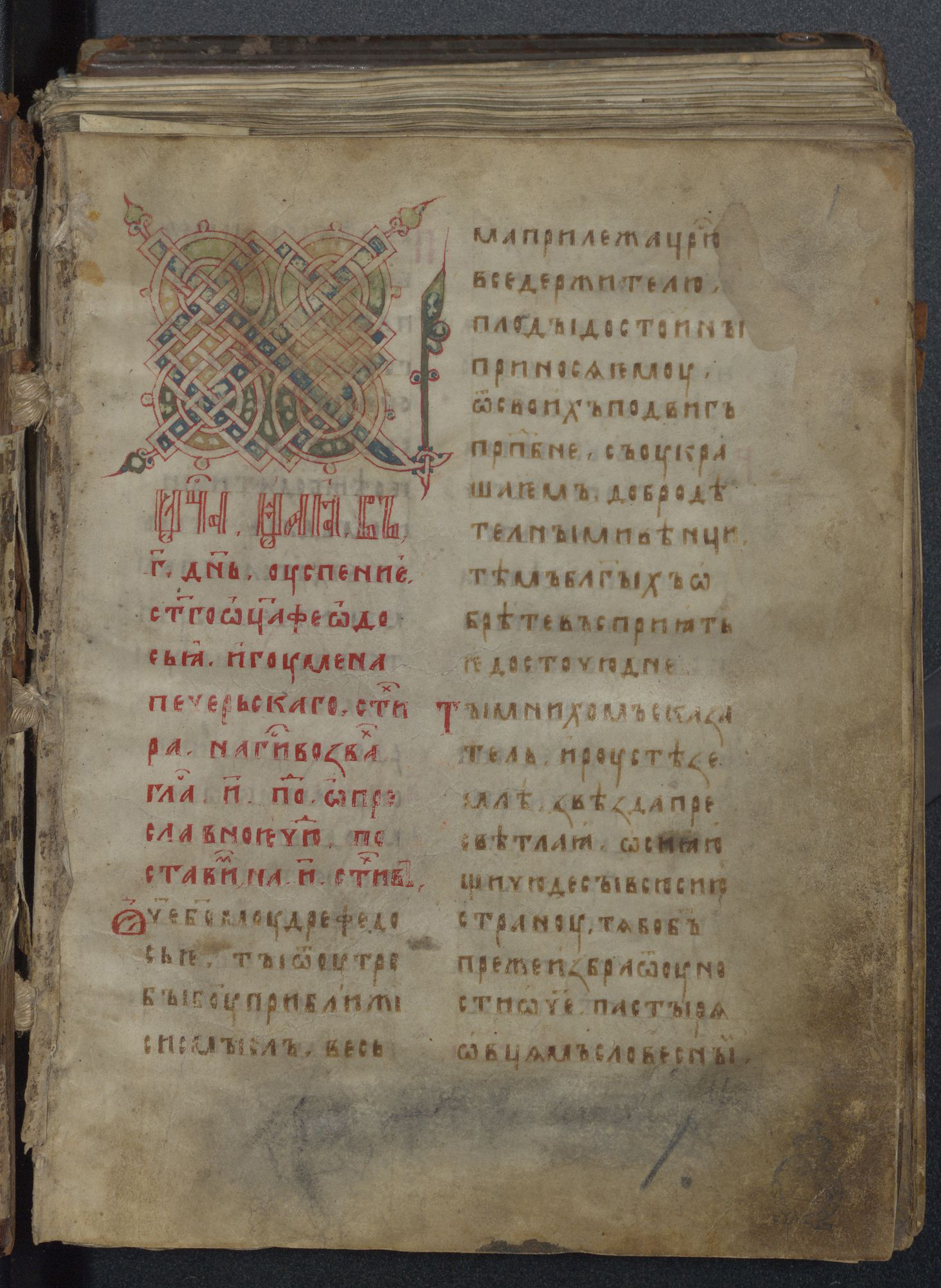 Первая страница рукописи